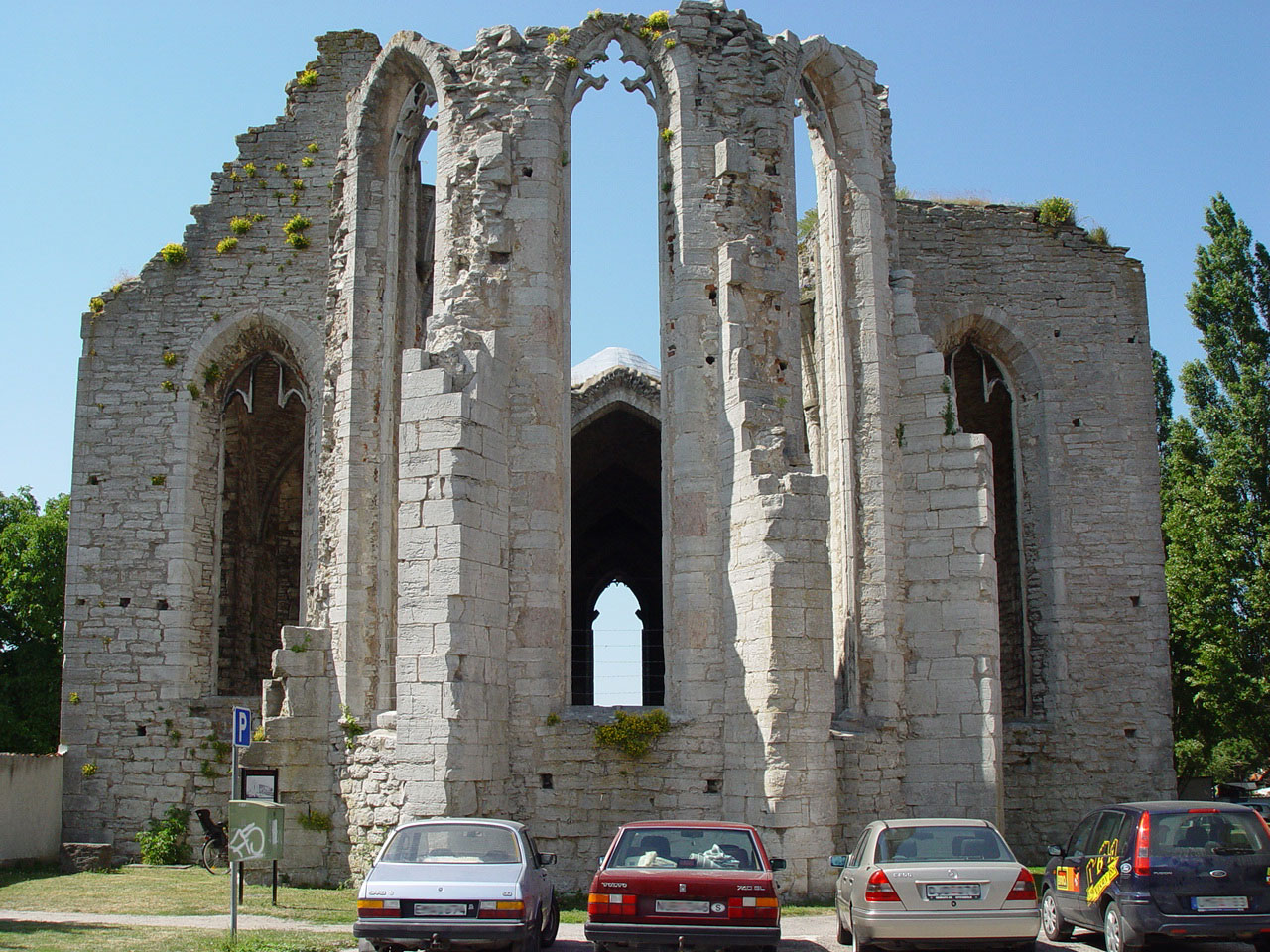 Kirchenruine St.Nicolai (St.Nicolaus) in Visby (Gotland). Erbaut 1230, zerstört 1525. (Sicht von Osten)